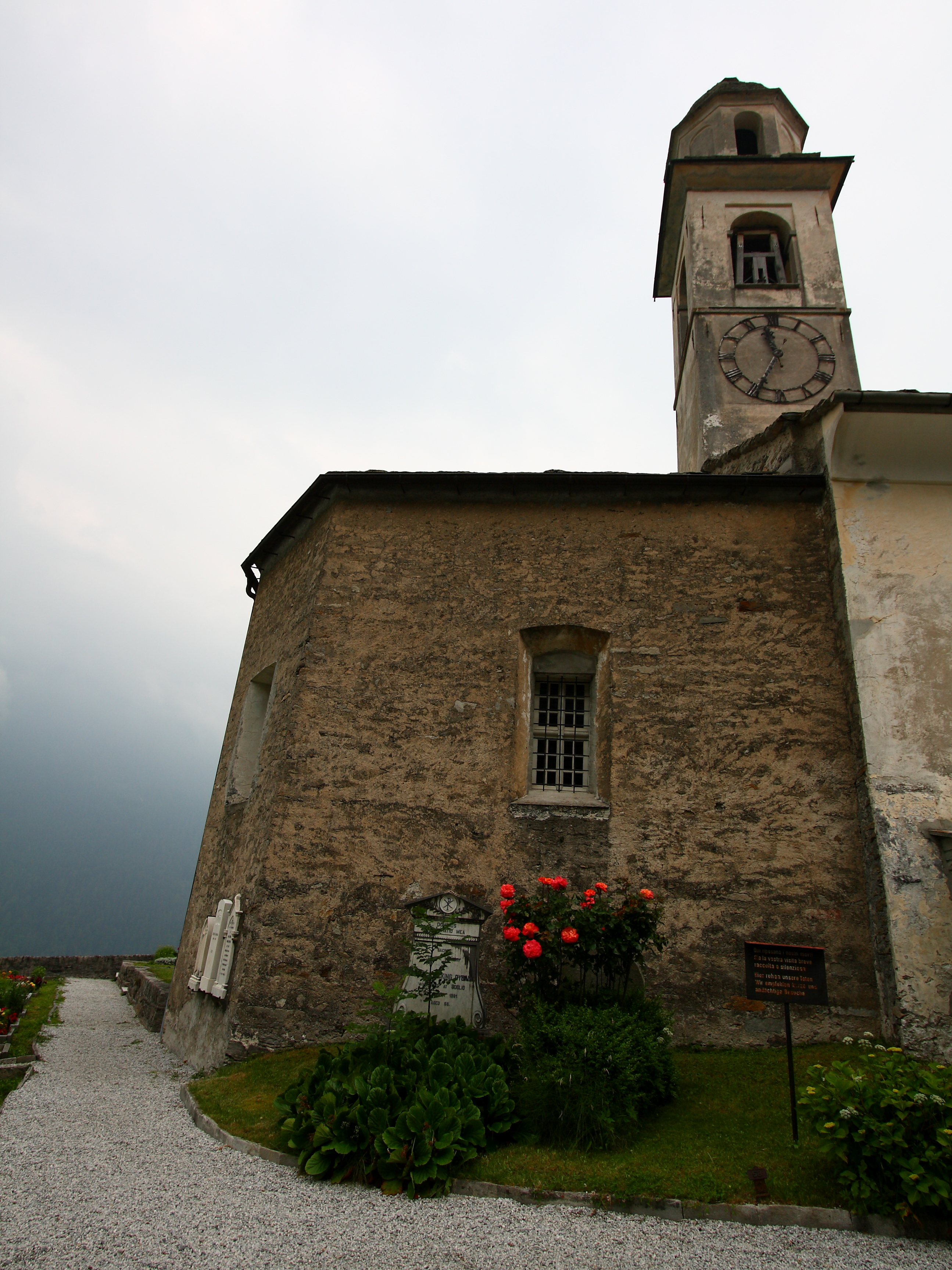 Village Church of Soglio, Graubunden, Switzerland